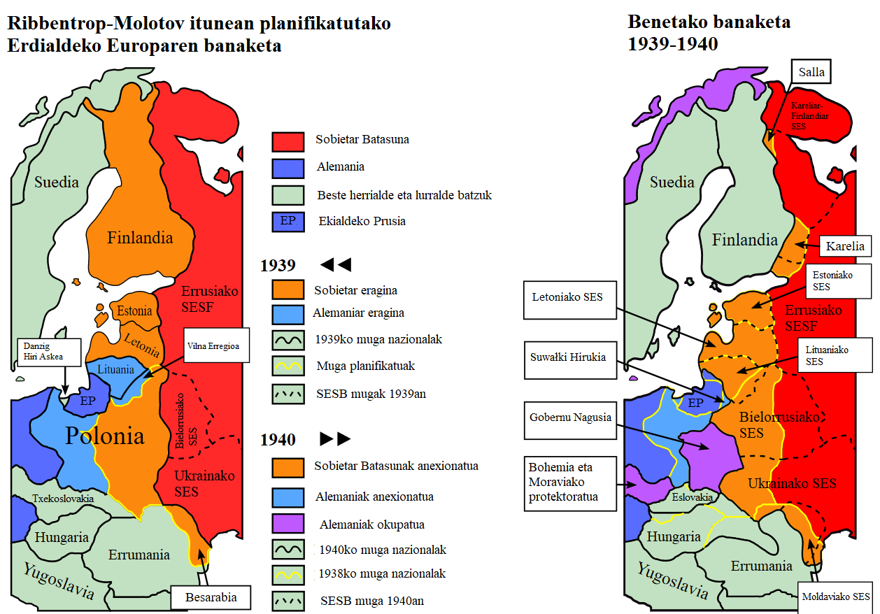 dena euskaratua eta txukundua